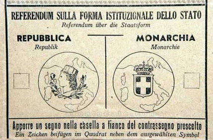 Scheda del referendum istituzionale del 2 giugno 1946